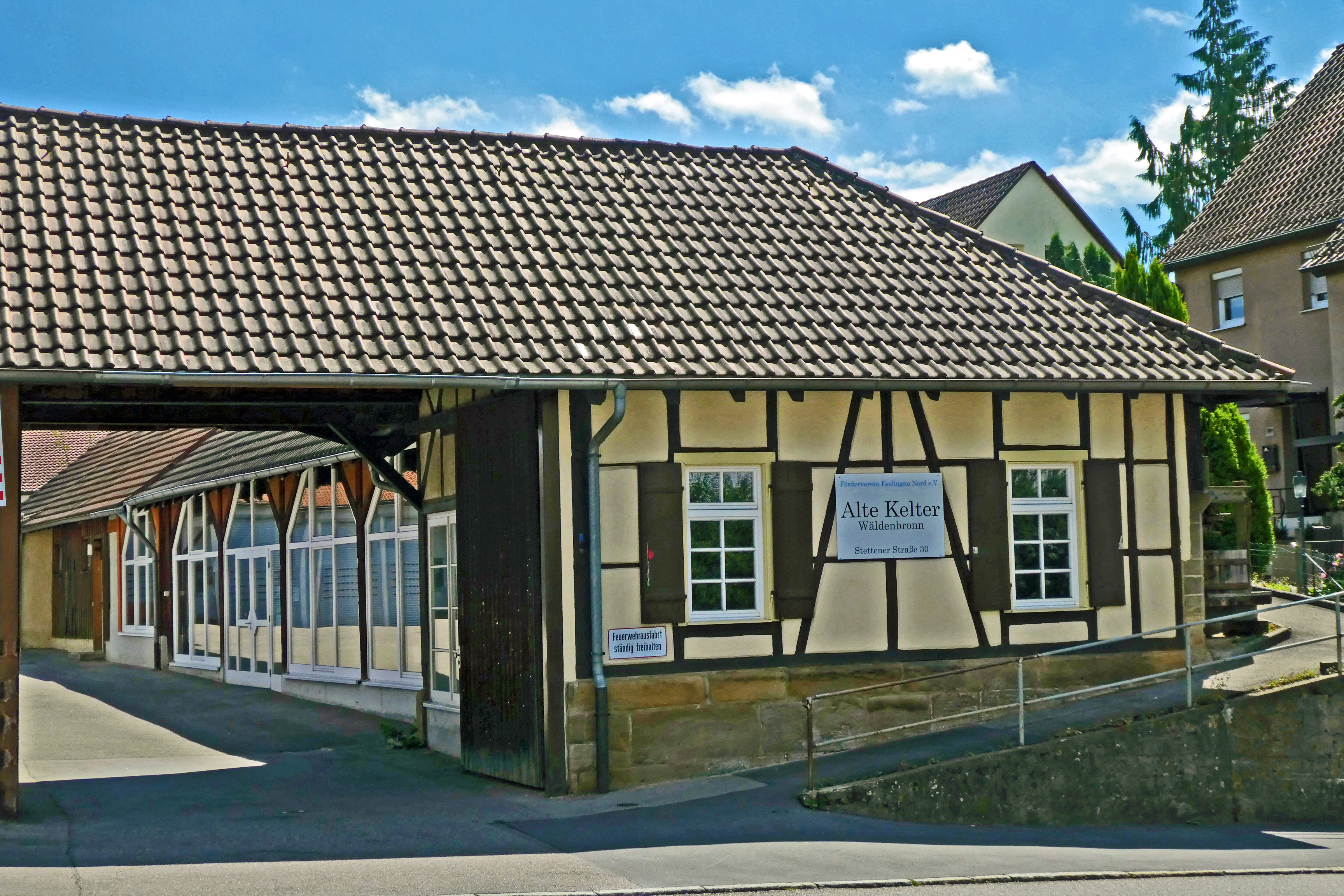 Die Alte Kelter in ES-Wäldenbronn aus dem Jahr 1881